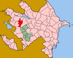 Map of Azerbaijan showing Khanlar (Xanlar) rayon.